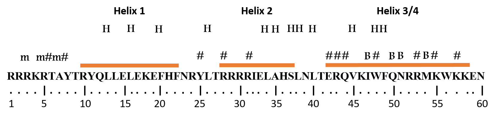 איור 1: תיאור מפת הגן Antennapedia (AntP). שימו לב למיקום ה-homeodomain. פנל תחתון: רצף חומצות האמינו באזור ה- homeodomainשל הגן.